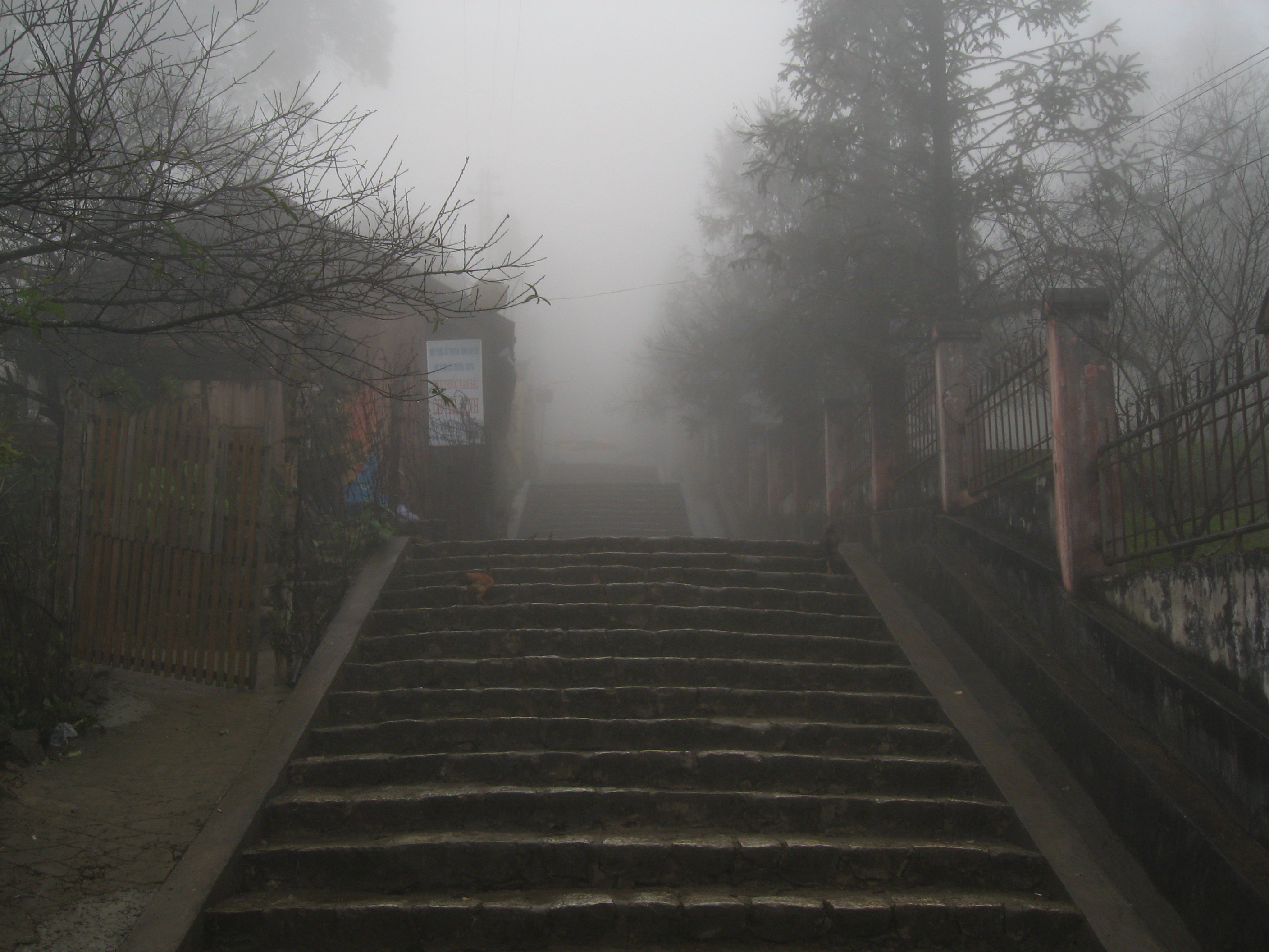 Sapa, Vietnam